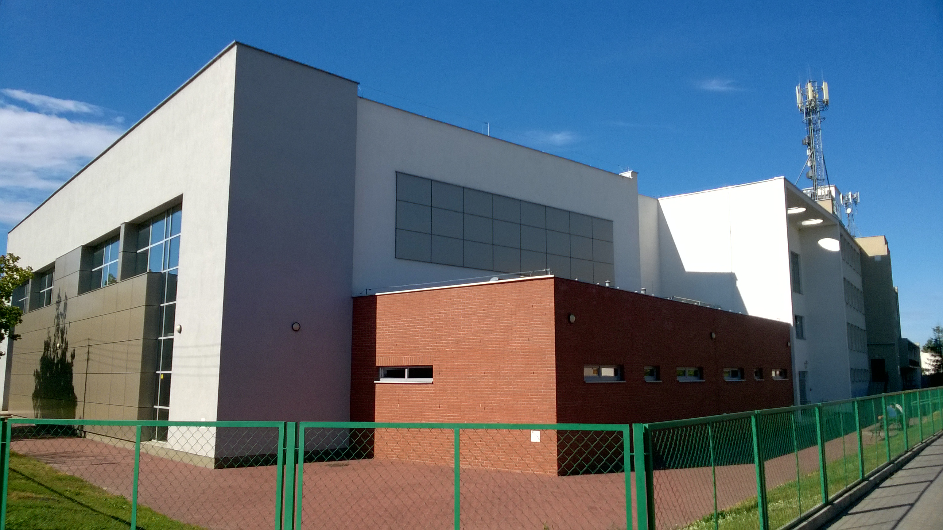 Szkoła Podstawowa nr 15 im. Władysława Broniewskiego oraz Gimnazjum nr 15 w Toruniu